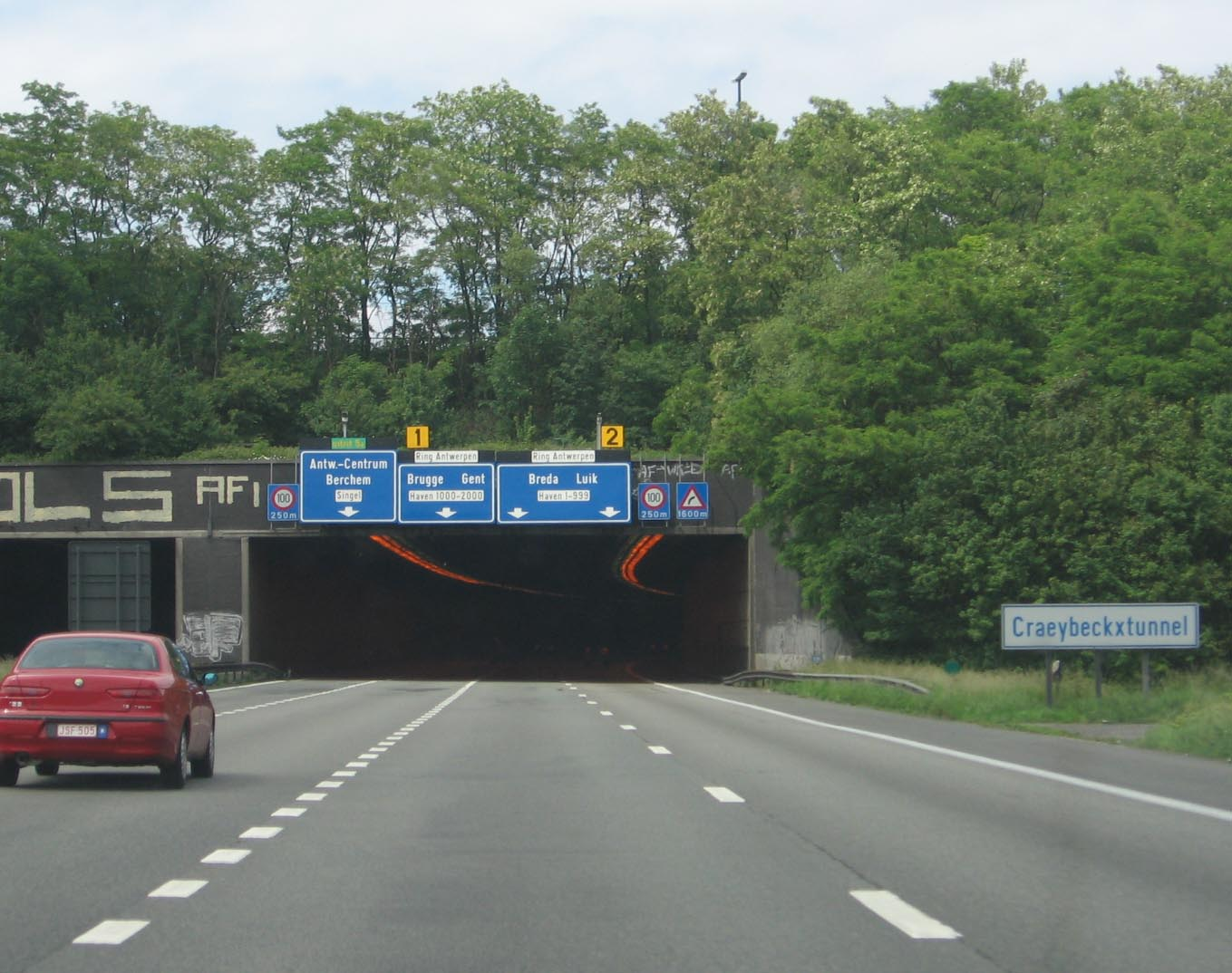 Craeybeckxtunnel